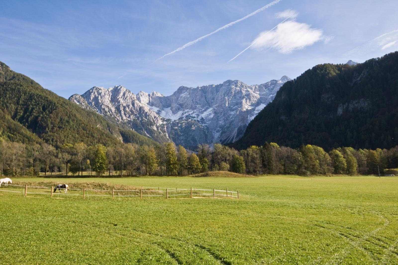 Afternoon in Jezersko - Kranjska Gora